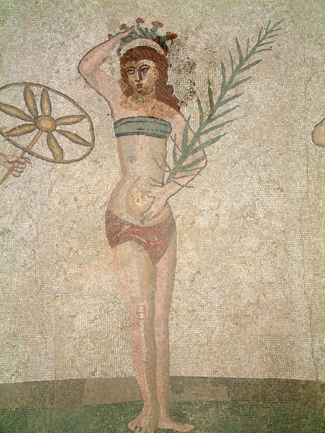 Noia en Bikini a Villa romana del Casale